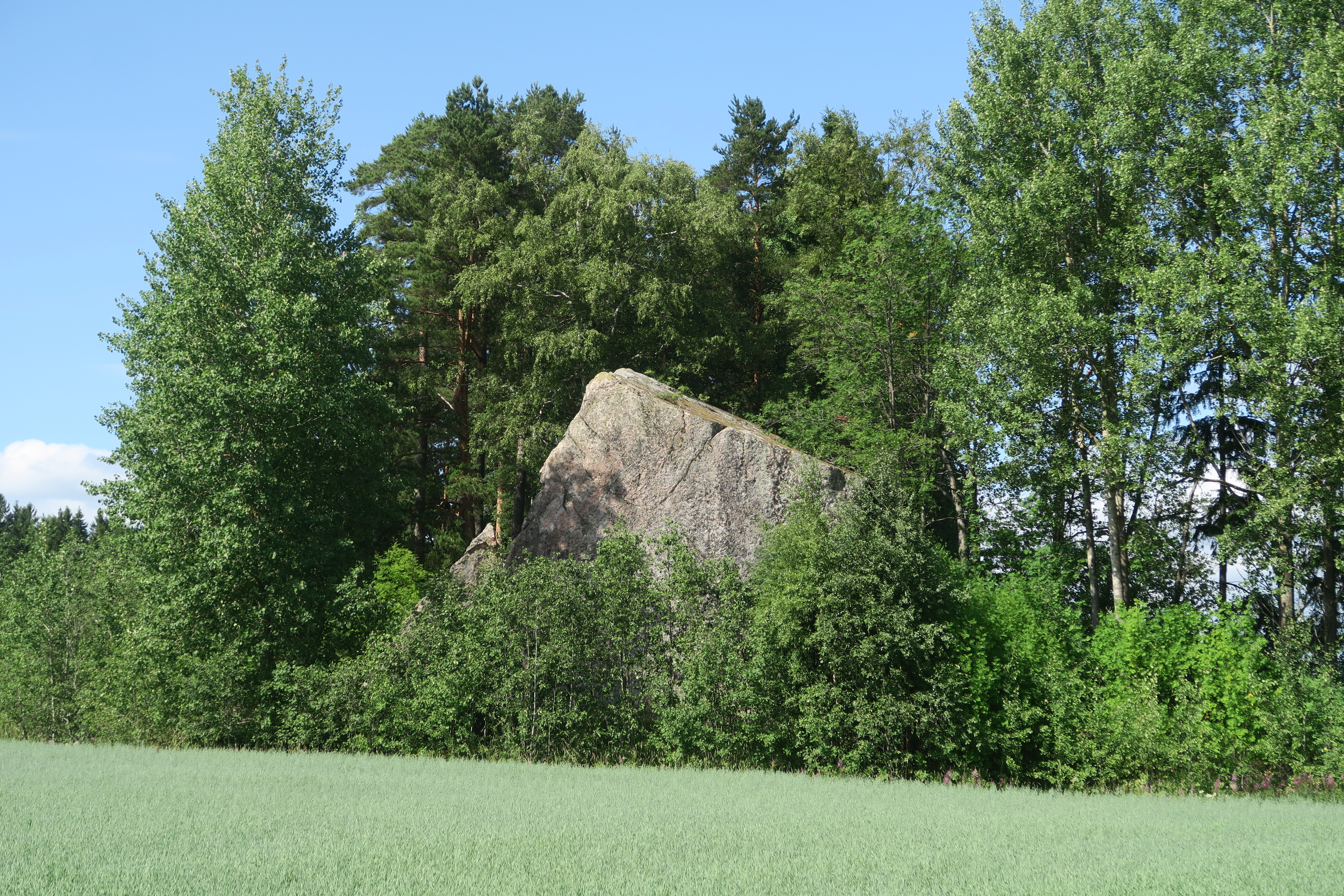 Hermolanvahan siirtolohkale Salossa entisellä Kiikalan ja Suomusjärven rajalla nähtynä etelästä Aneriojärven luonto- ja kulttuuripolun reitiltä.